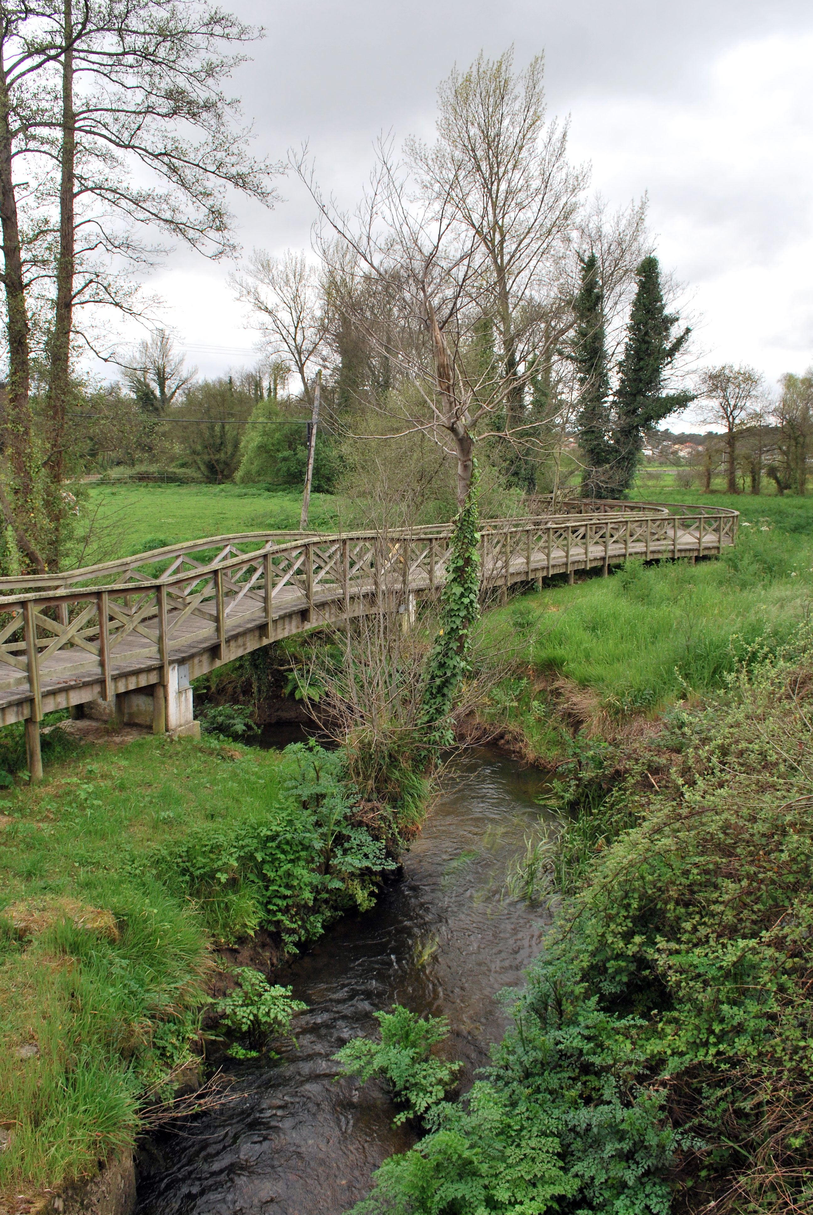 Río Quenxe ao paso por Vilaño na Laracha